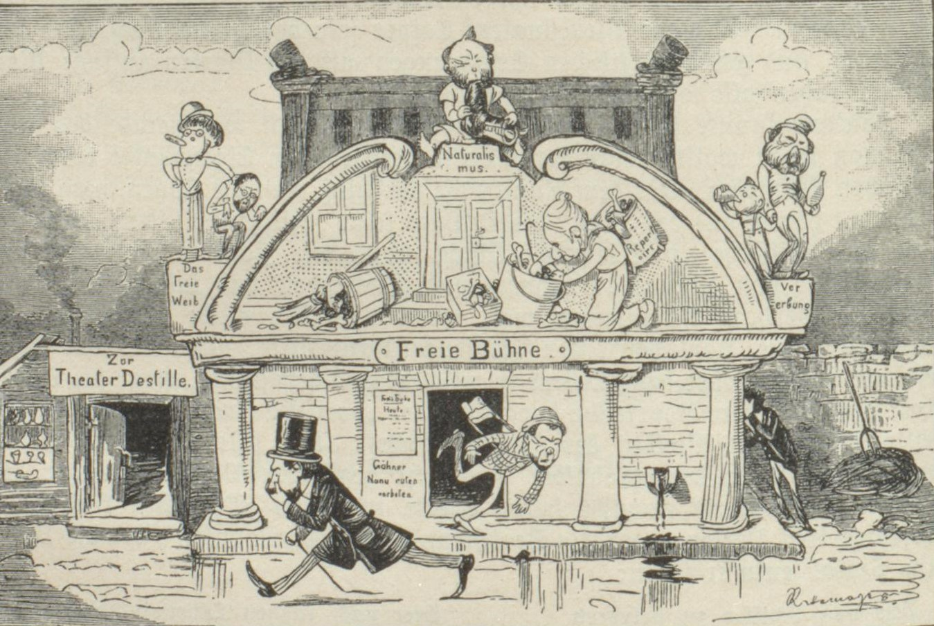 Ernst Retemeyer Freie Bühne Berlin Kladderadatsch 1890